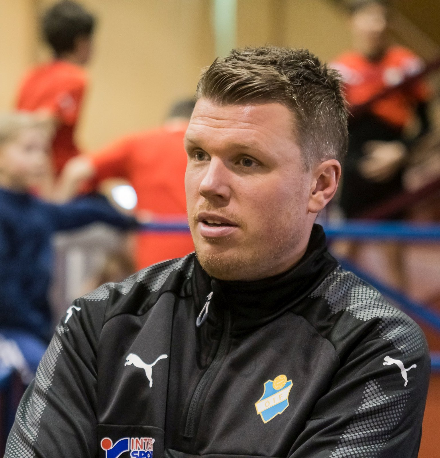 Den svenske fotbollstränaren och före detta spelaren Christian Järdler i Växjö Tipshall under en intervju inför Svenska Cupen 2018.